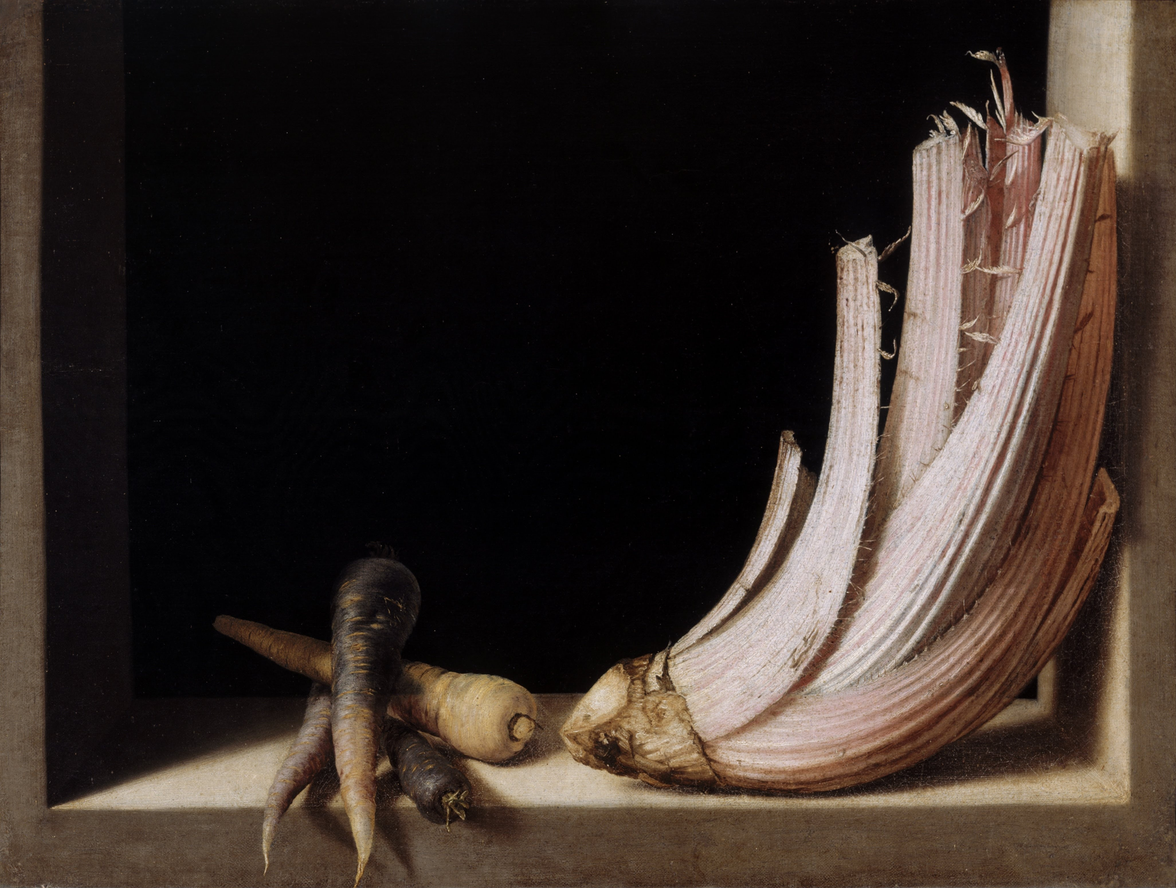 Bodegón del cardo,title QS:P1476,es:"Bodegón del cardo,"